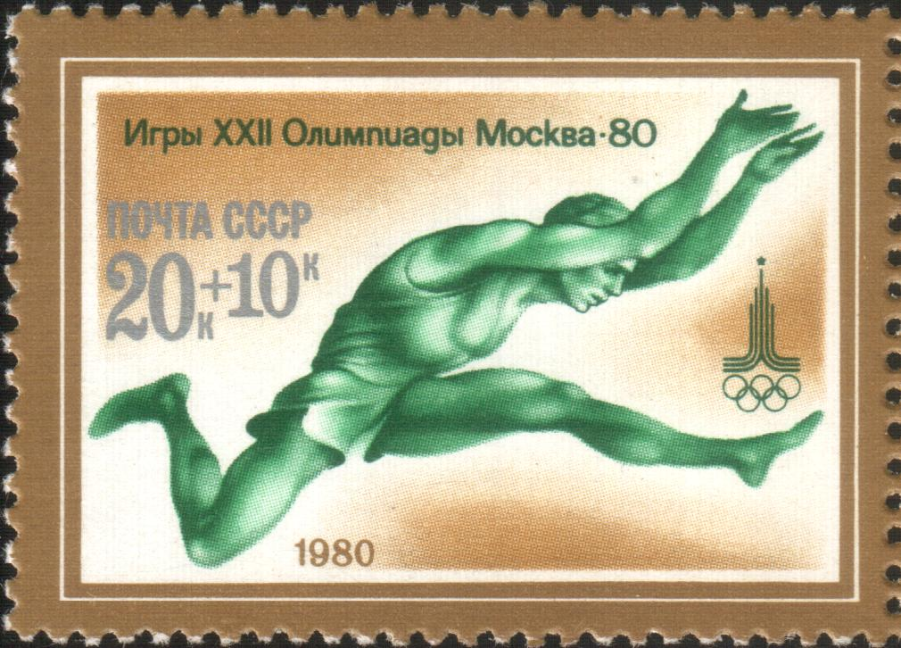 Почтовая марка СССР из серии «Игры XXII Олимпиады. Москва (19/VII—3/VIII). Легкая атлетика», выпущенная в 1980 году. На марке изображены фигура спортсмена, символизирующая прыжки в длину, эмблема Олимпиады. Художник — Н. Литвинов. Номер — 5043 (ЦФА). Тираж — 1,2 млн экз. Описание — по изданию «Почтовые марки СССР 1980: Каталог», М., Радио и связь, 1981.